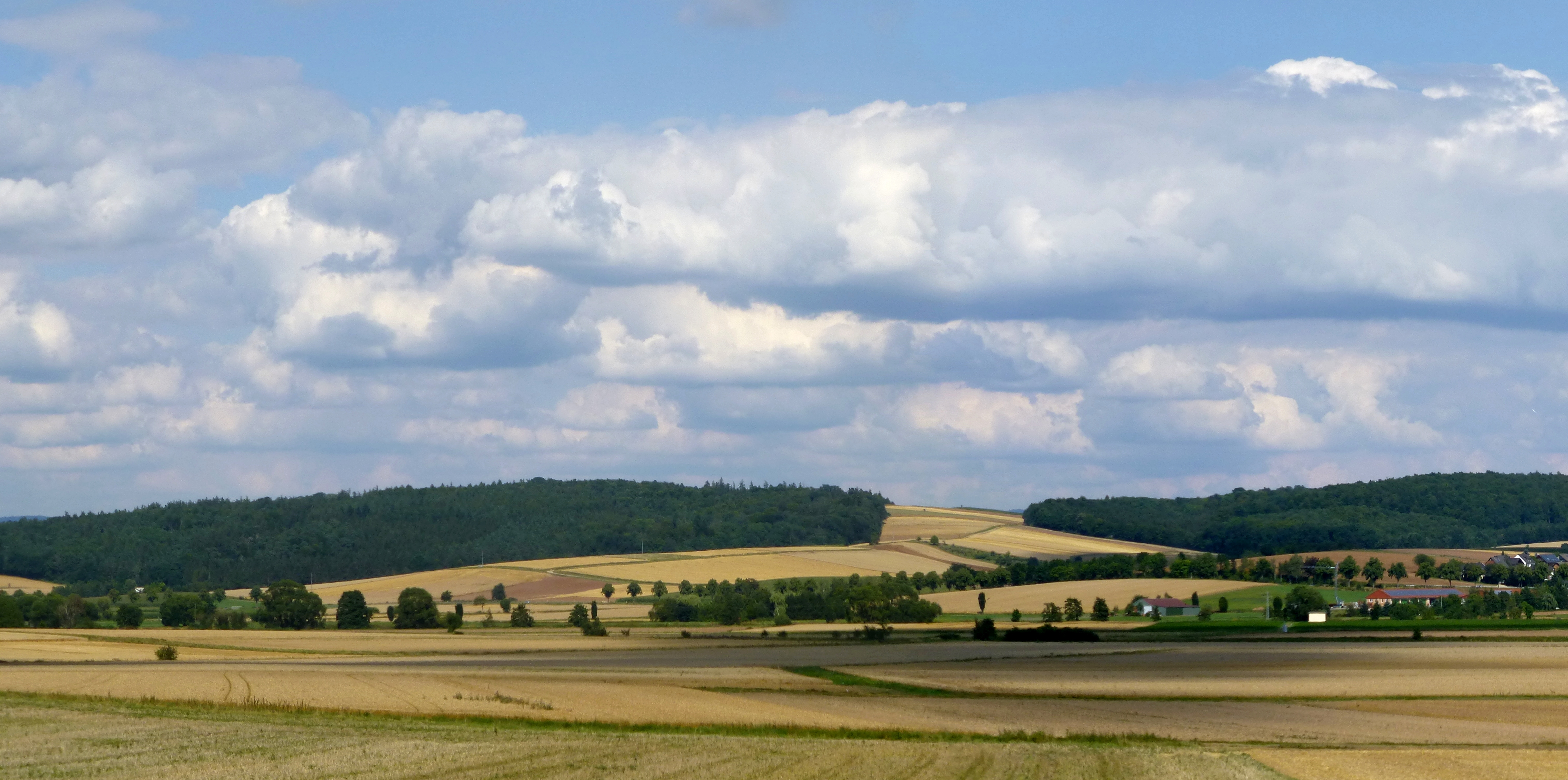 Blick von Westen vom Roten Berg (bei Germershausen) auf den Hellberg bei Obernfeld